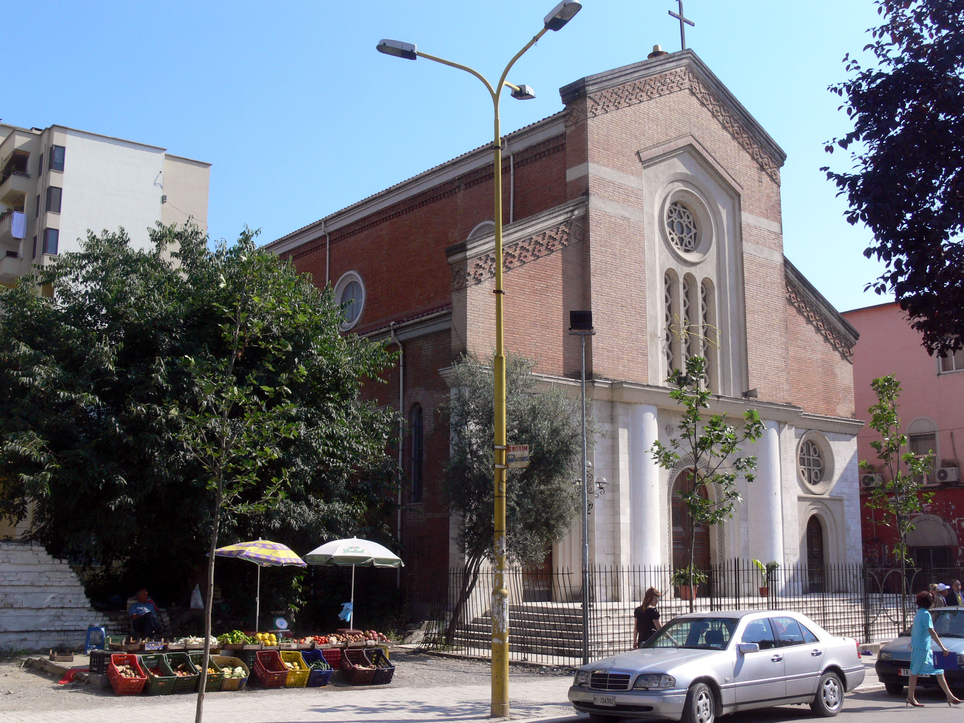 Tirana. Katholische Basilika.